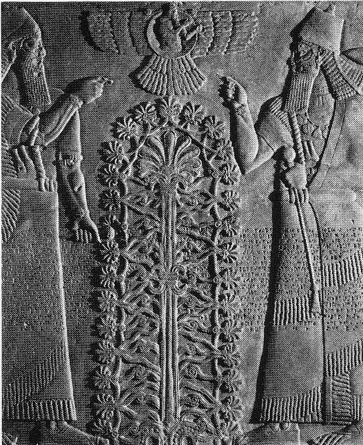 eigen foto 2005